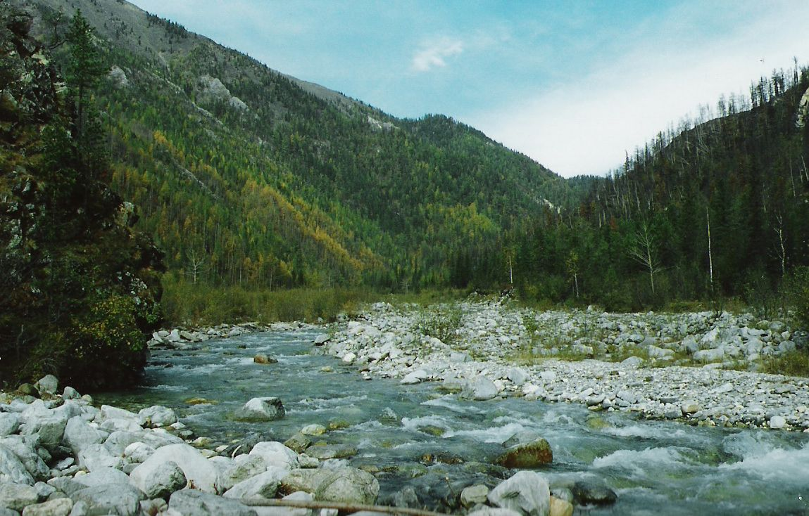 Řeka Kyrdynga, Rusko, pohoří Východní Sajan